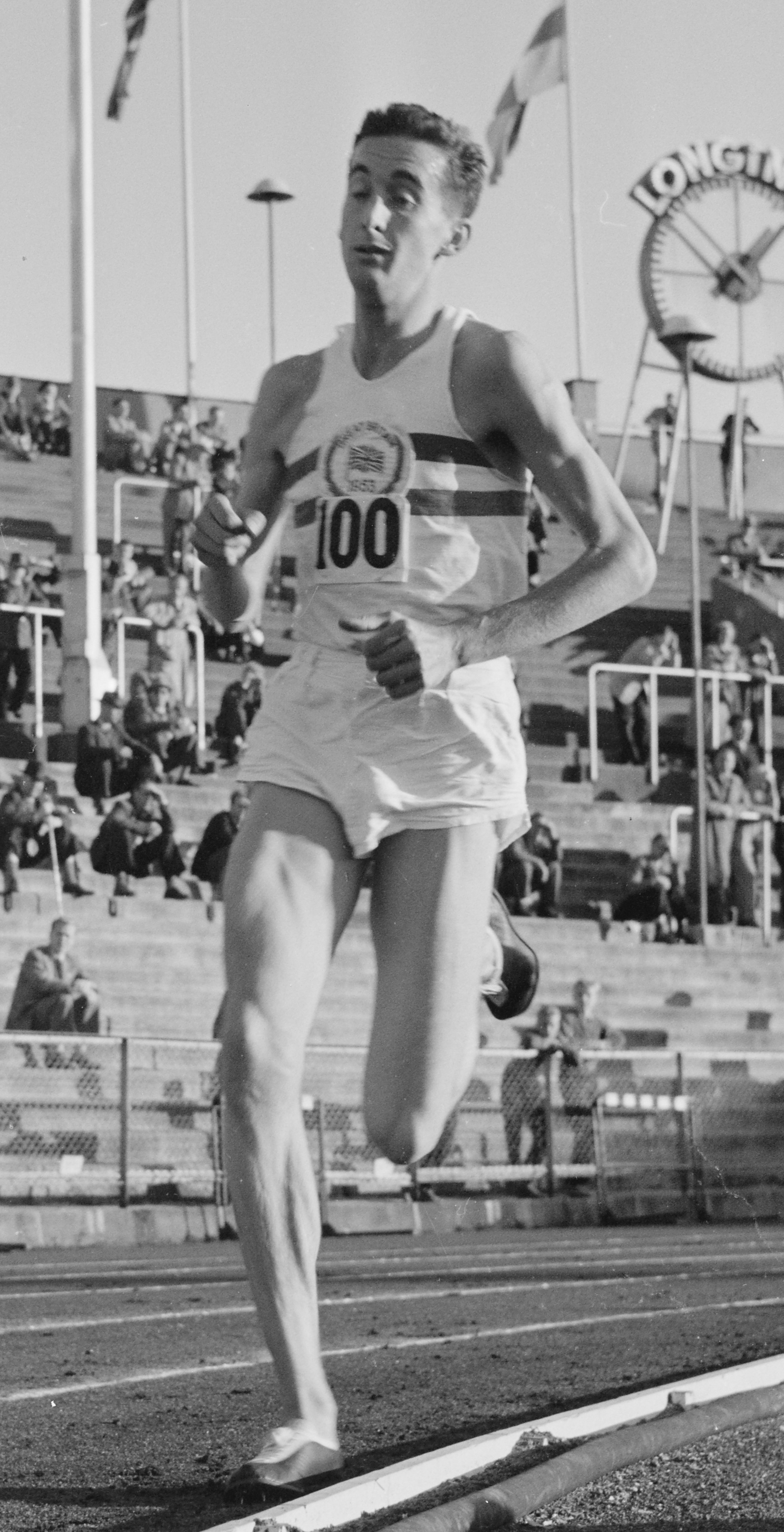 Bildet er hentet fra Arkivverket. Friidrett, Bislet (Oslo-lekene). NÅ nr. 20, 1953. A: Sverre Strandli, slegge; Imre Nemeth, slegge; Joseph Czermak, slegge; Egil Danielsen, spyd; Gordon Pirie, langdistanse; Audun Boysen, mellomdistanse (med Nielsen); Gunnar Nielsen, dansk mellomdistanseløper.B: Tabori; Ikaros; Boysen; Strandli; Danielsen Arkivinstitusjon : Riksarkivet Arkivnavn : Billedbladet NÅ Sted : Norge, Oslo, Oslo, Bislet Emneord: Friidrett, Sport, Idrett Avbildet